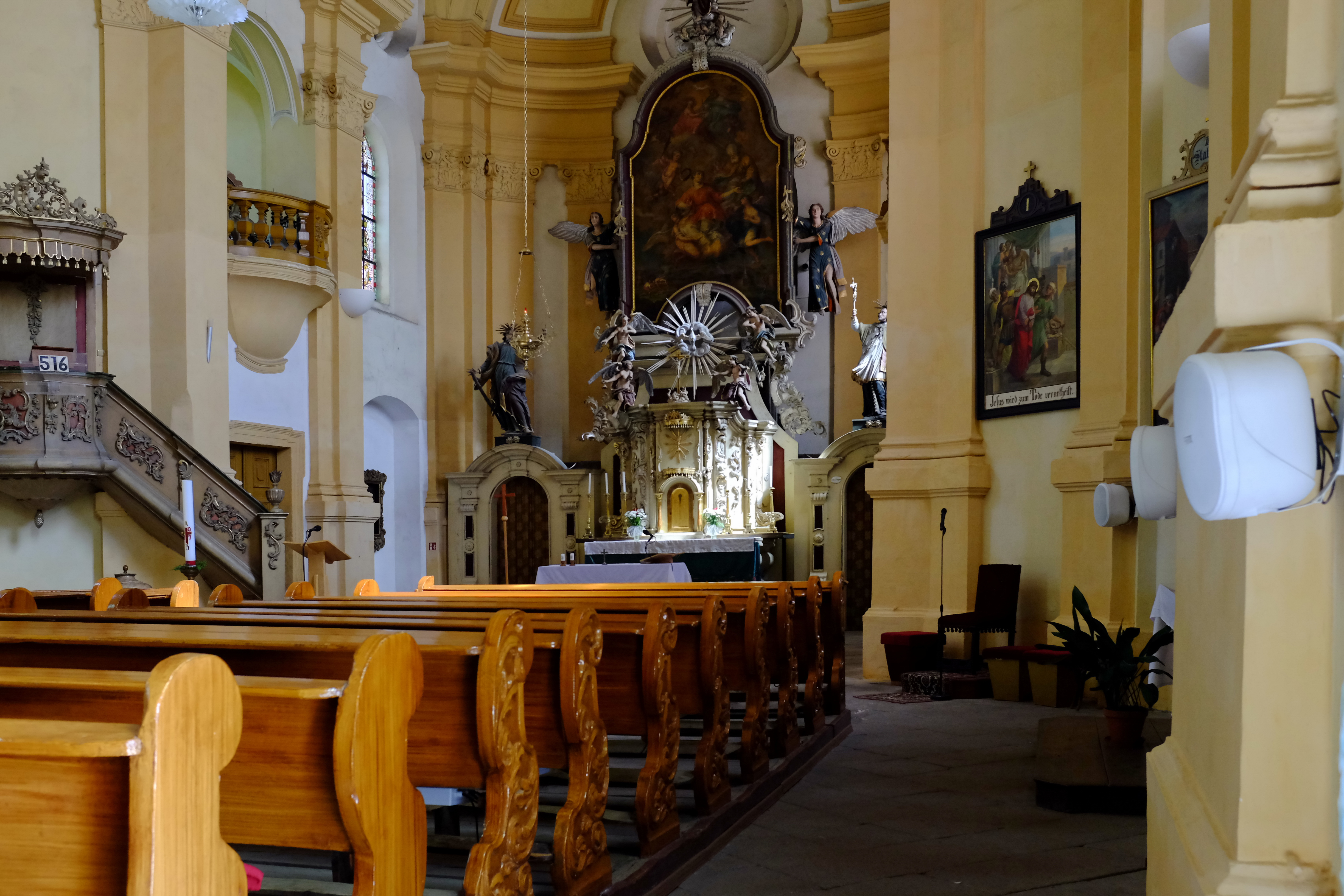 Kostel svatého Vavřince, náměstí Míru, Chodov (okres Sokolov).